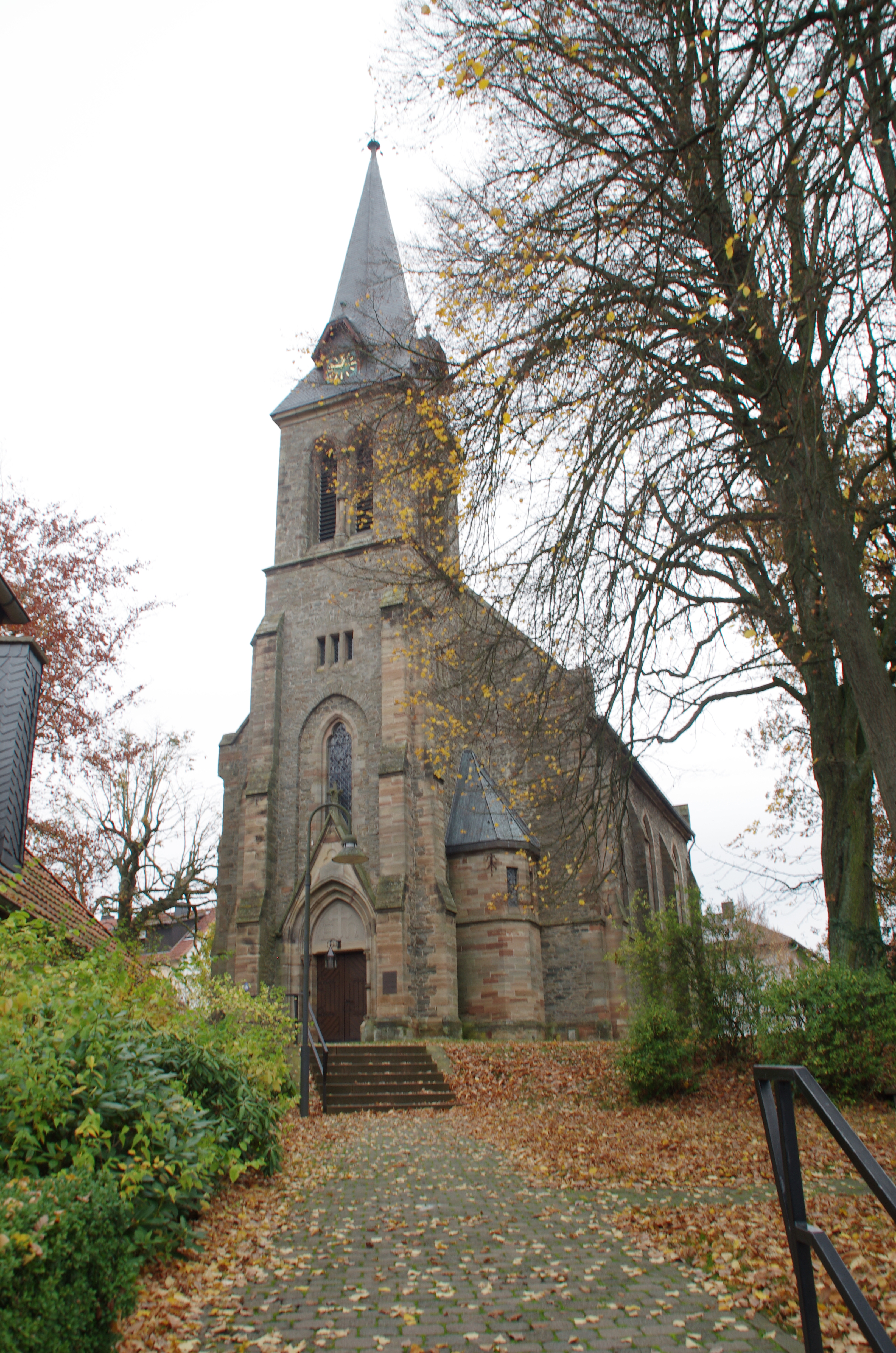 Frankenau in Hessen. Die Eingangseite mit Turm der von 1866 bis 1878 erbauten Kirche